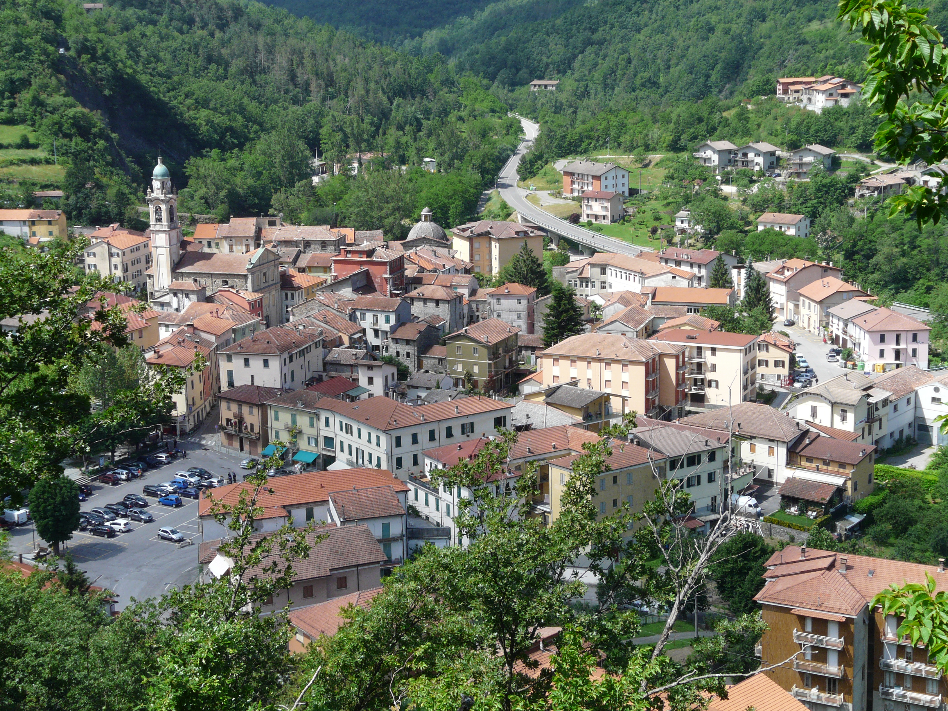 Panorama di Ottone, Emilia-Romagna, Italia